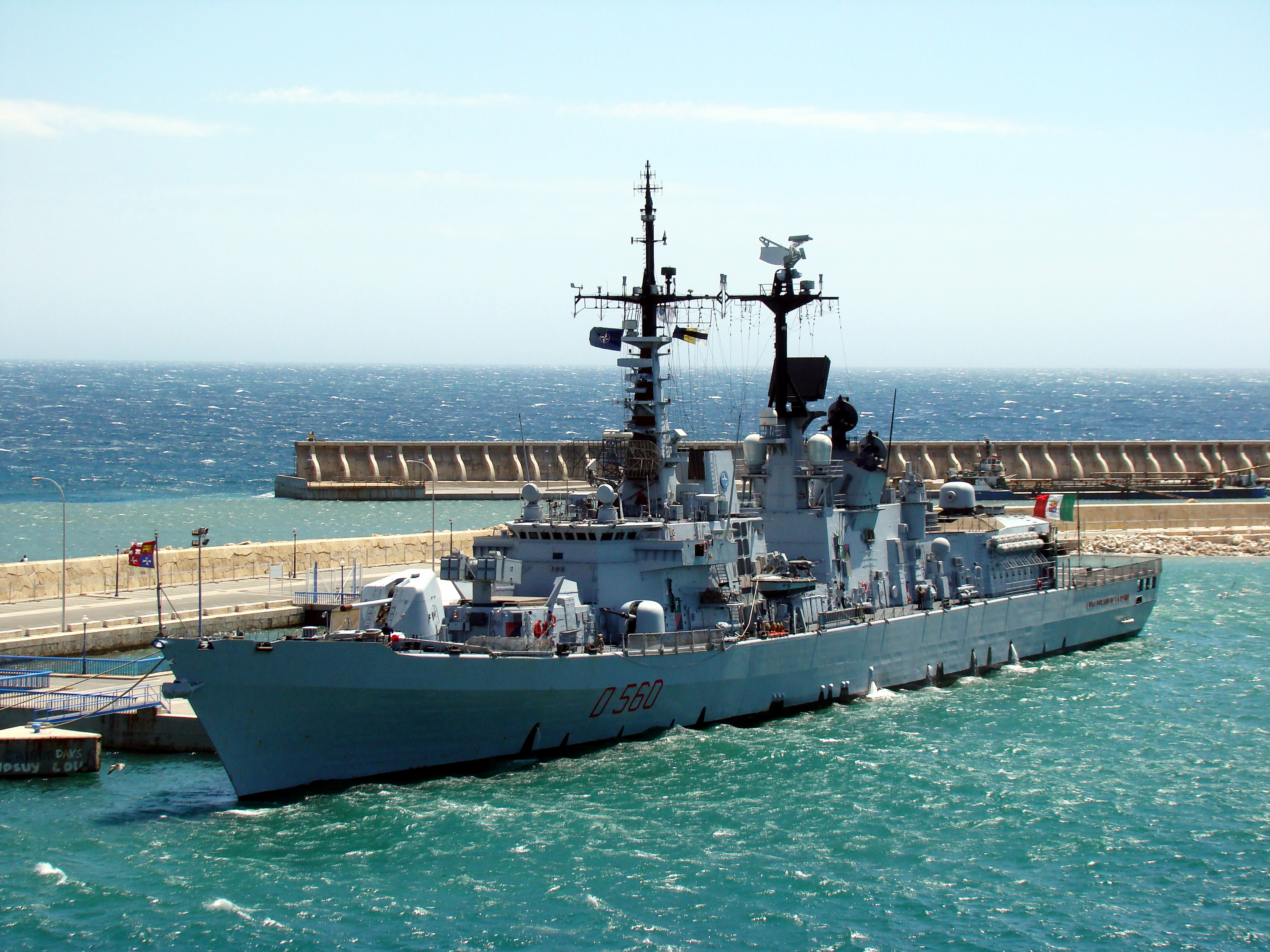 Il cacciatorpediniere Durand de la Penne ormeggiato nel porto spagnolo di Malaga